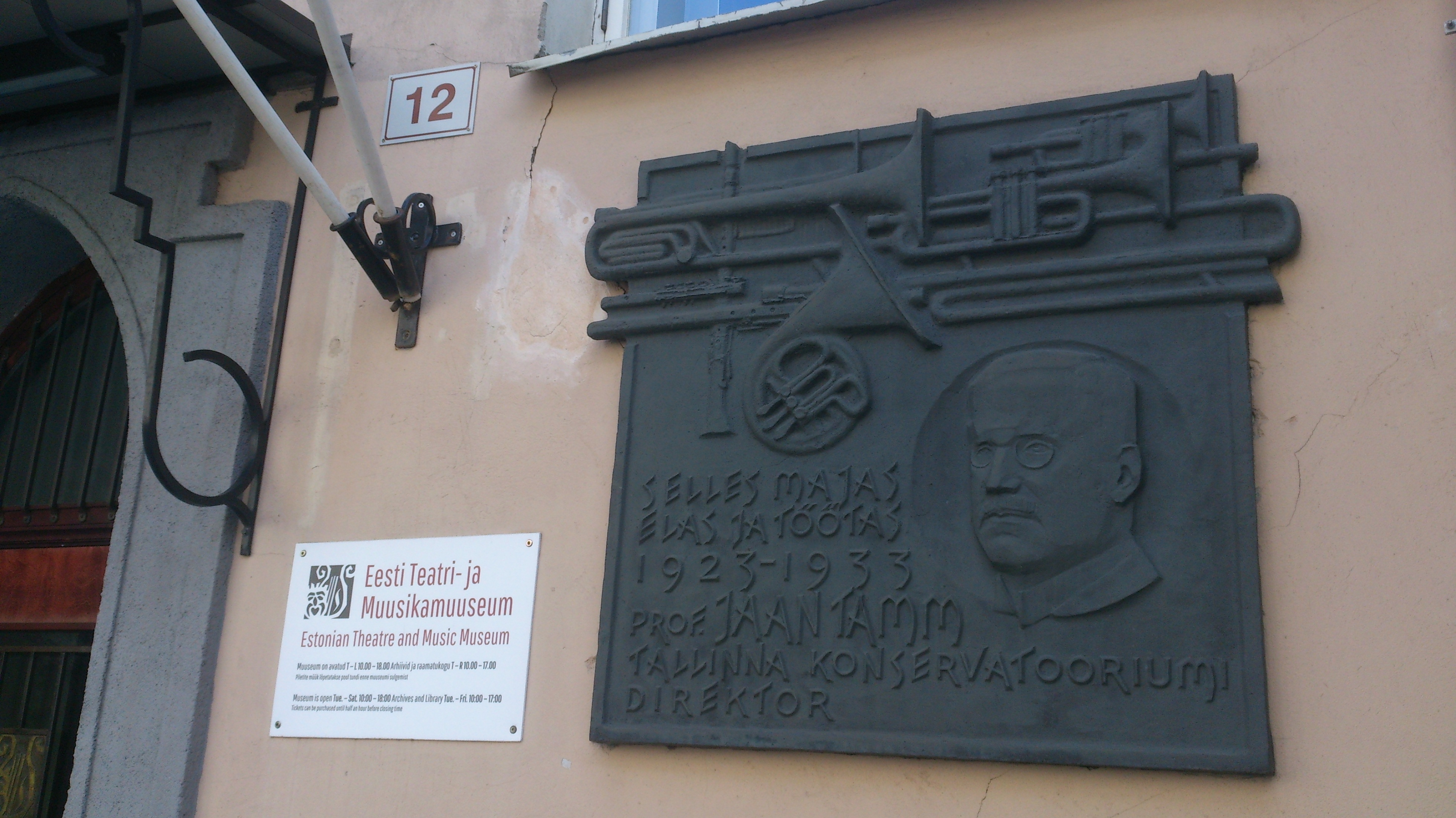 Jaan Tamme mälestustahvel Teatri- ja Muusikamuuseumil Tallinnas, Müürivahe 12